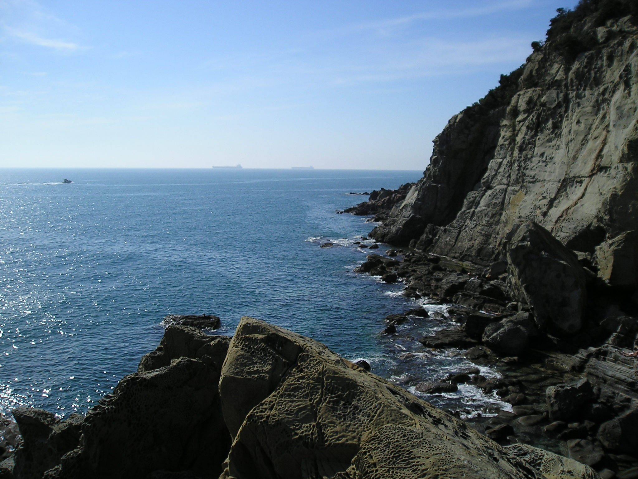 Scogliera del Sassoscritto (Livorno)